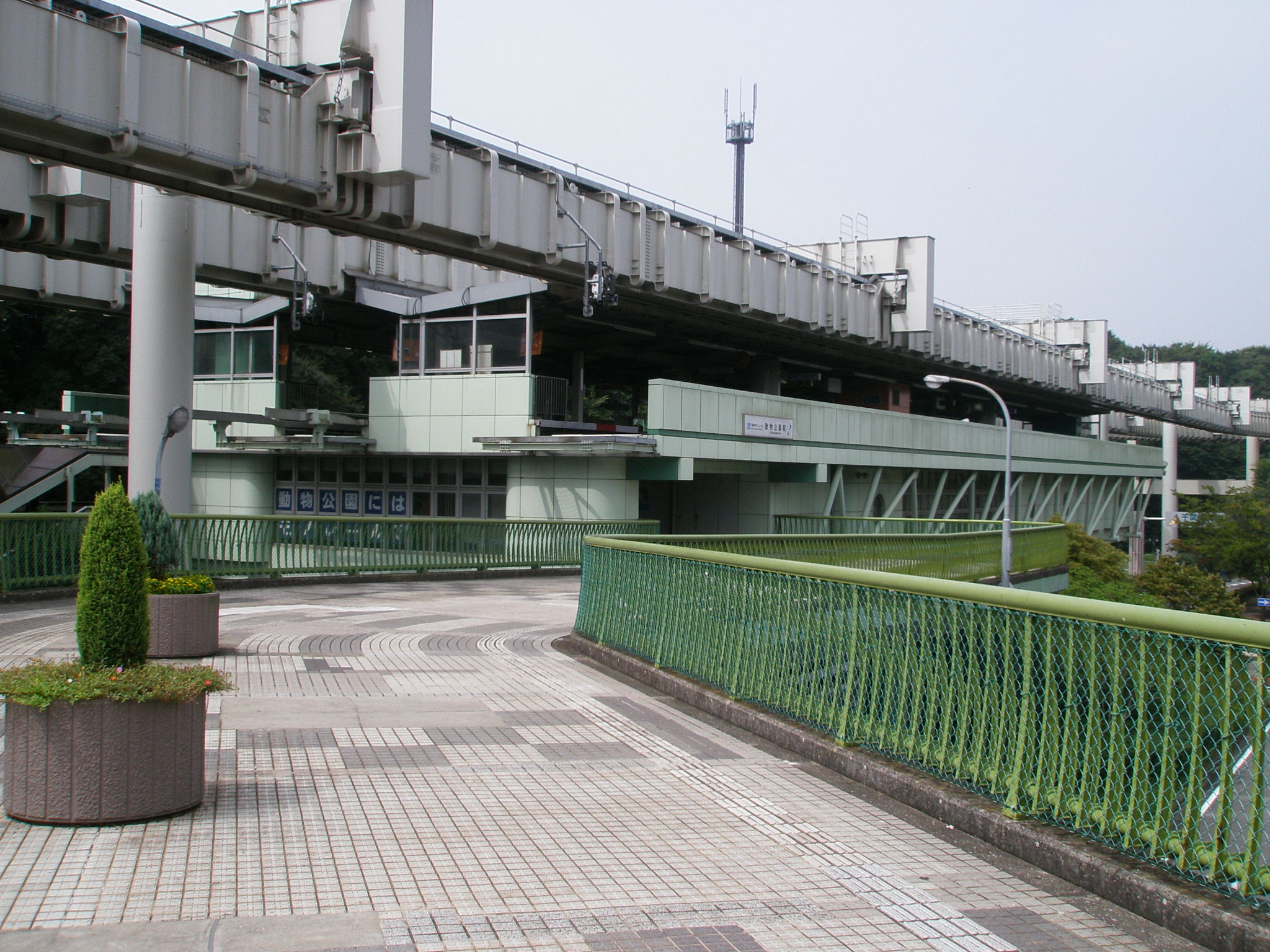 千葉都市モノレール2号線、動物公園駅外観